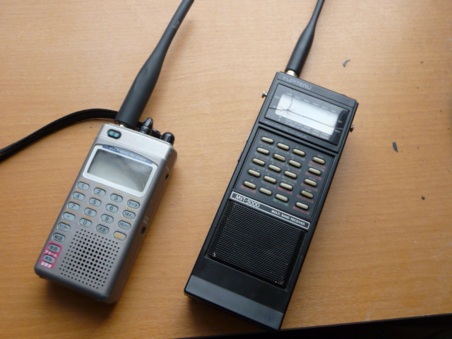 市販のマルチバンド受信機の一例